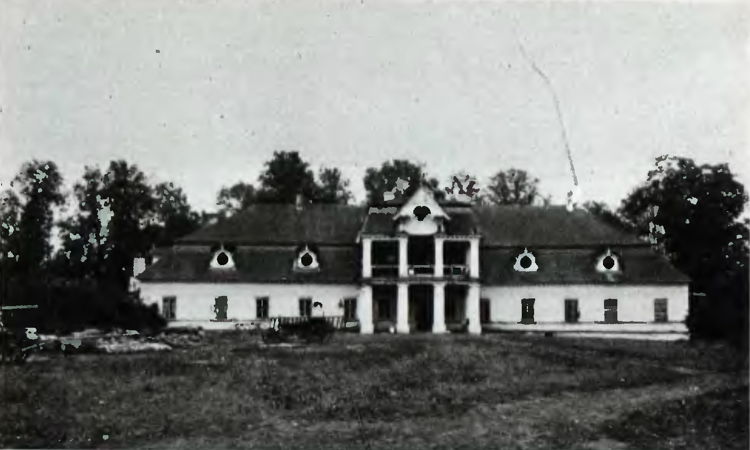 Беларуская (тарашкевіца): Манькавічы (Mańkavičy), сядзіба Друцкіх-Любецкіх (Drucki-Lubiecki)